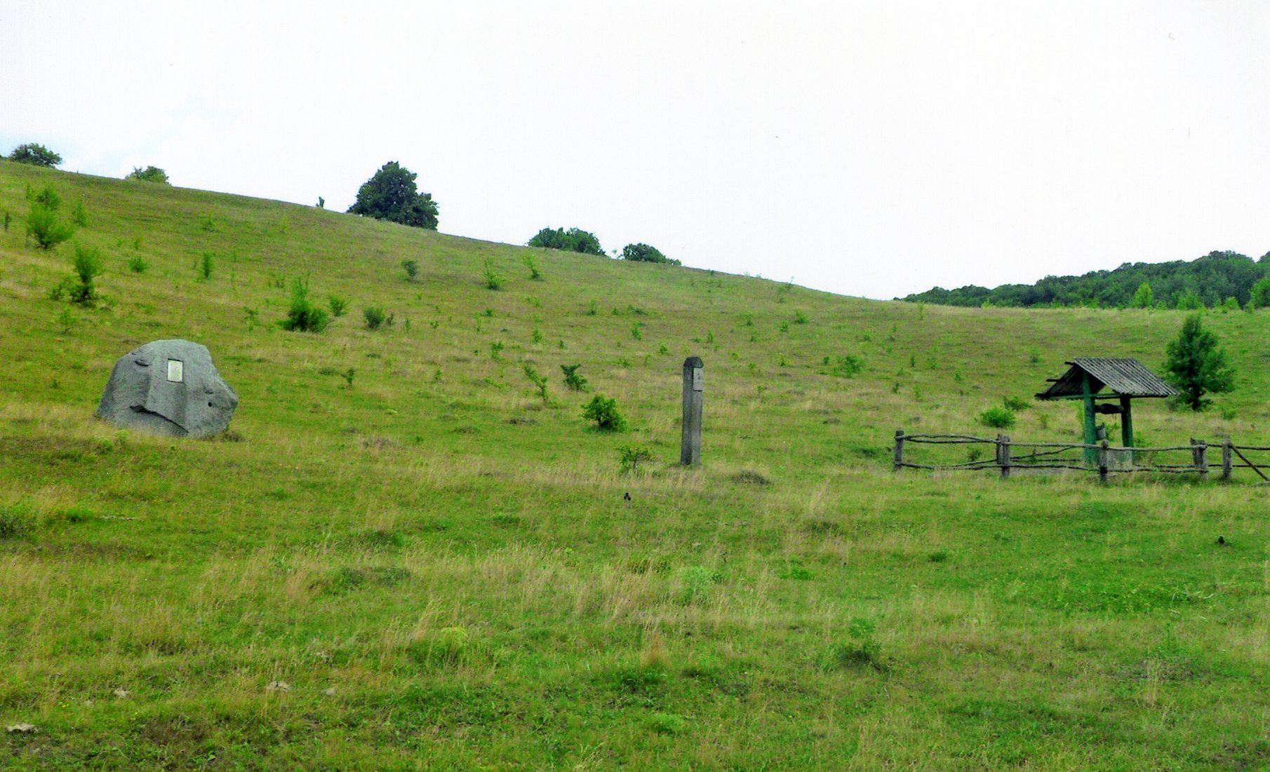 Парубоцька криниця або Криниця Слави у Цибулівці